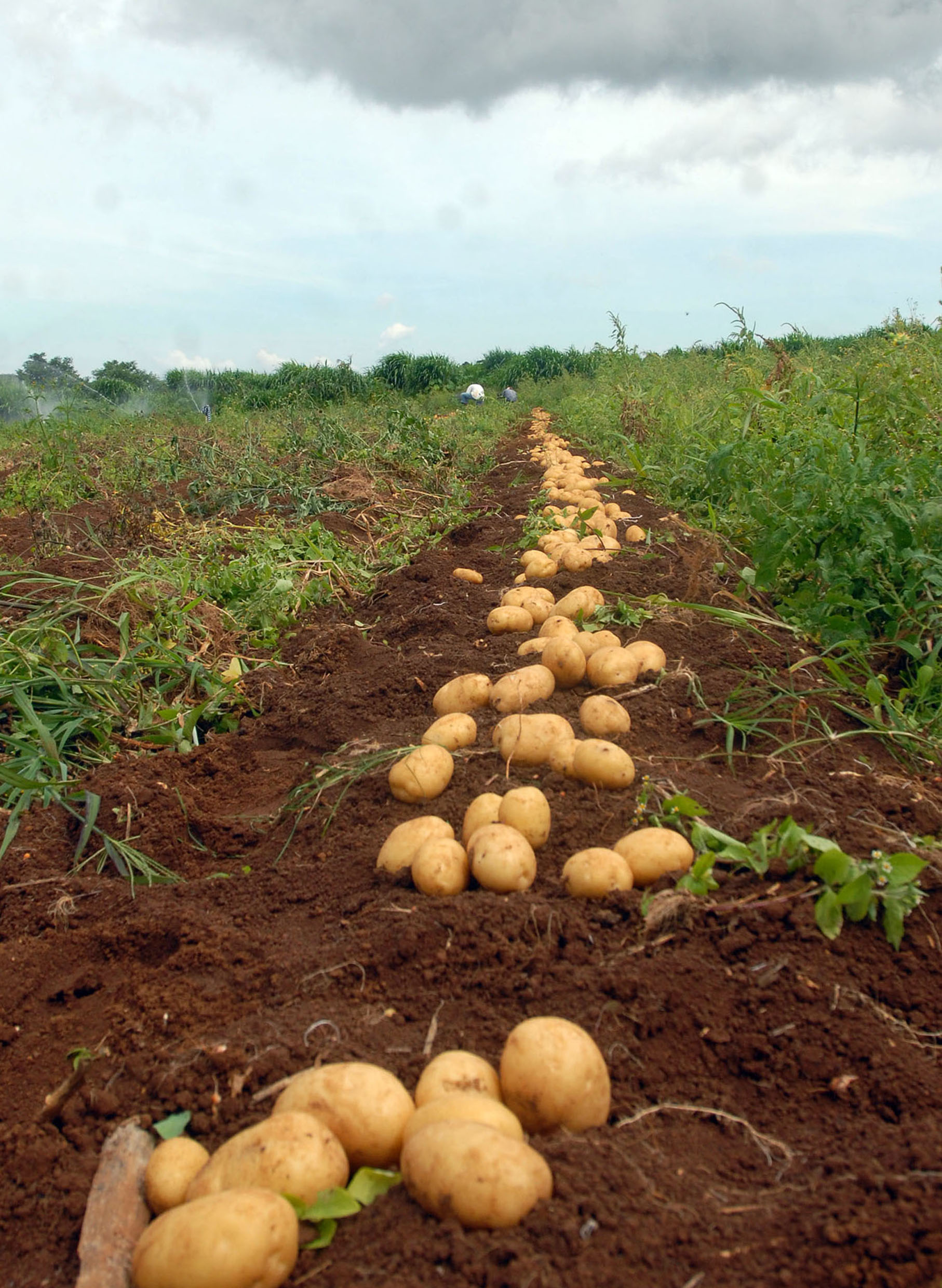 Alimentos orgânico